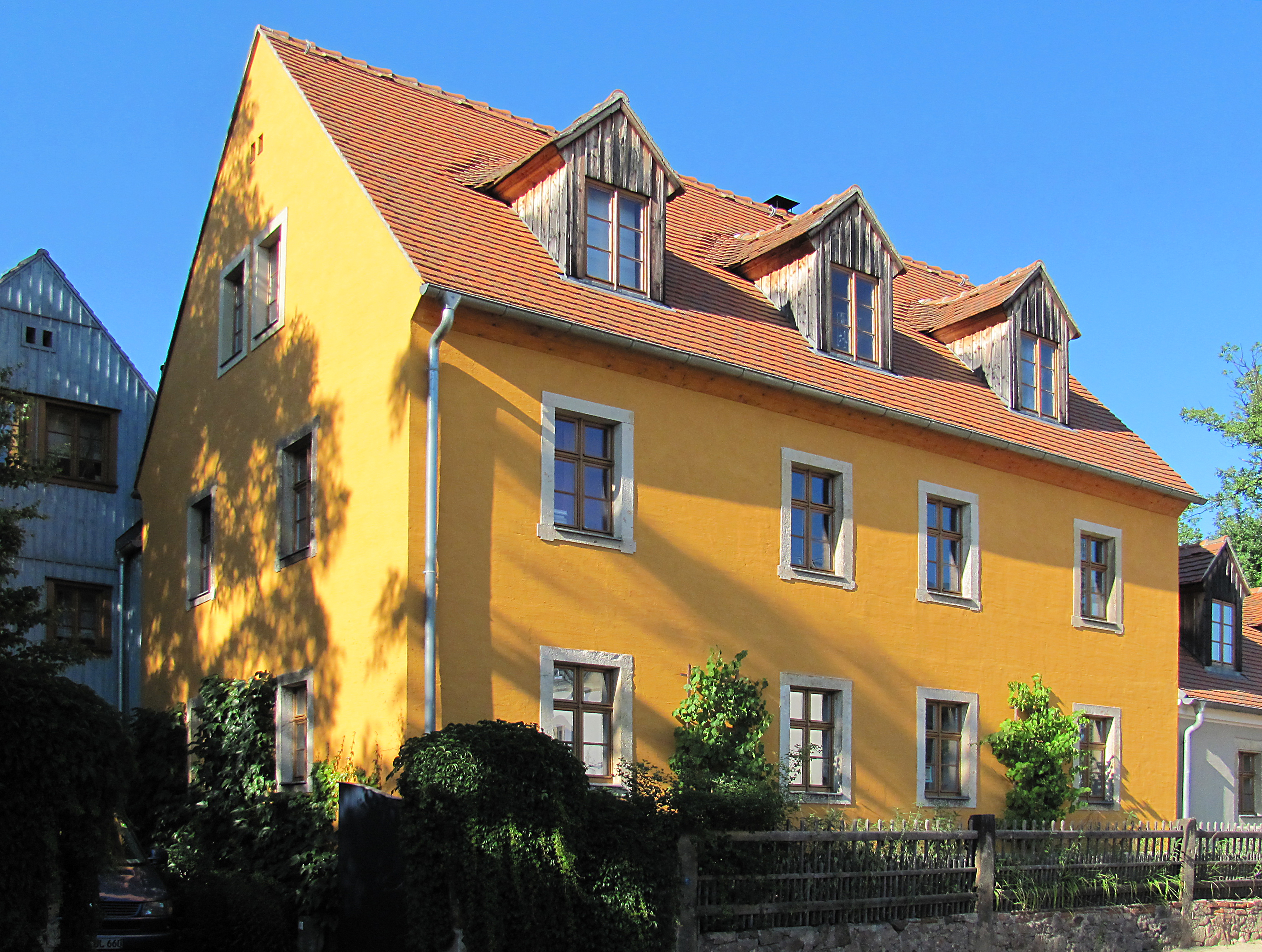 Radebeul Haus Klotzsche von Westen